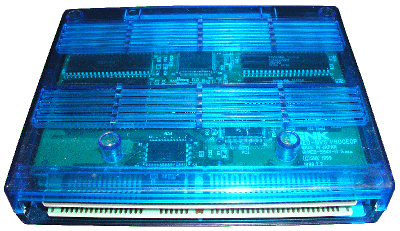 Cartouche Neo-Geo MVS (Metal Slug X: Super Vehicle-001)